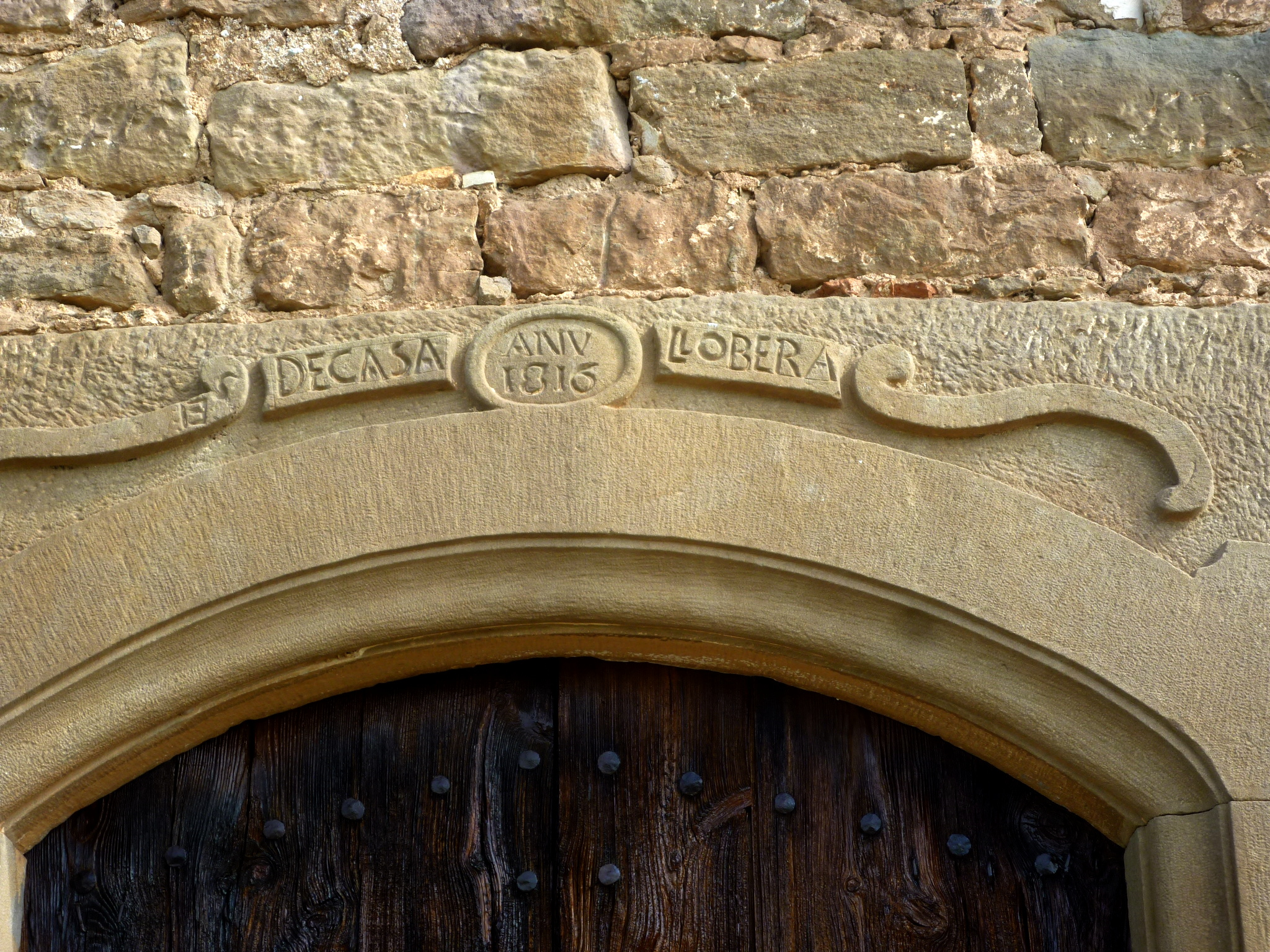 Capella de Santa Magdalena de Sió (els Plans de Sió): llinda de la portada